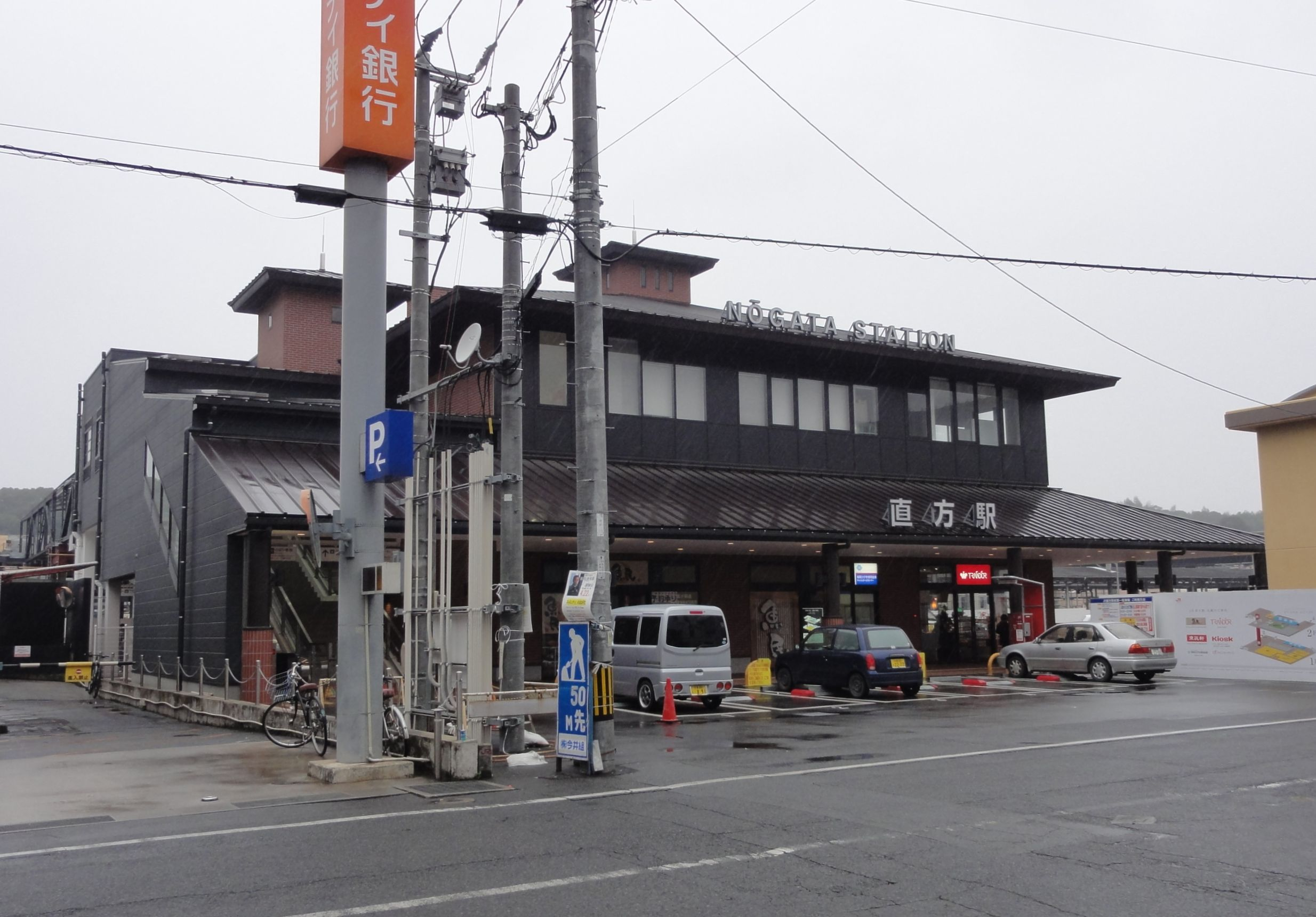 直方駅